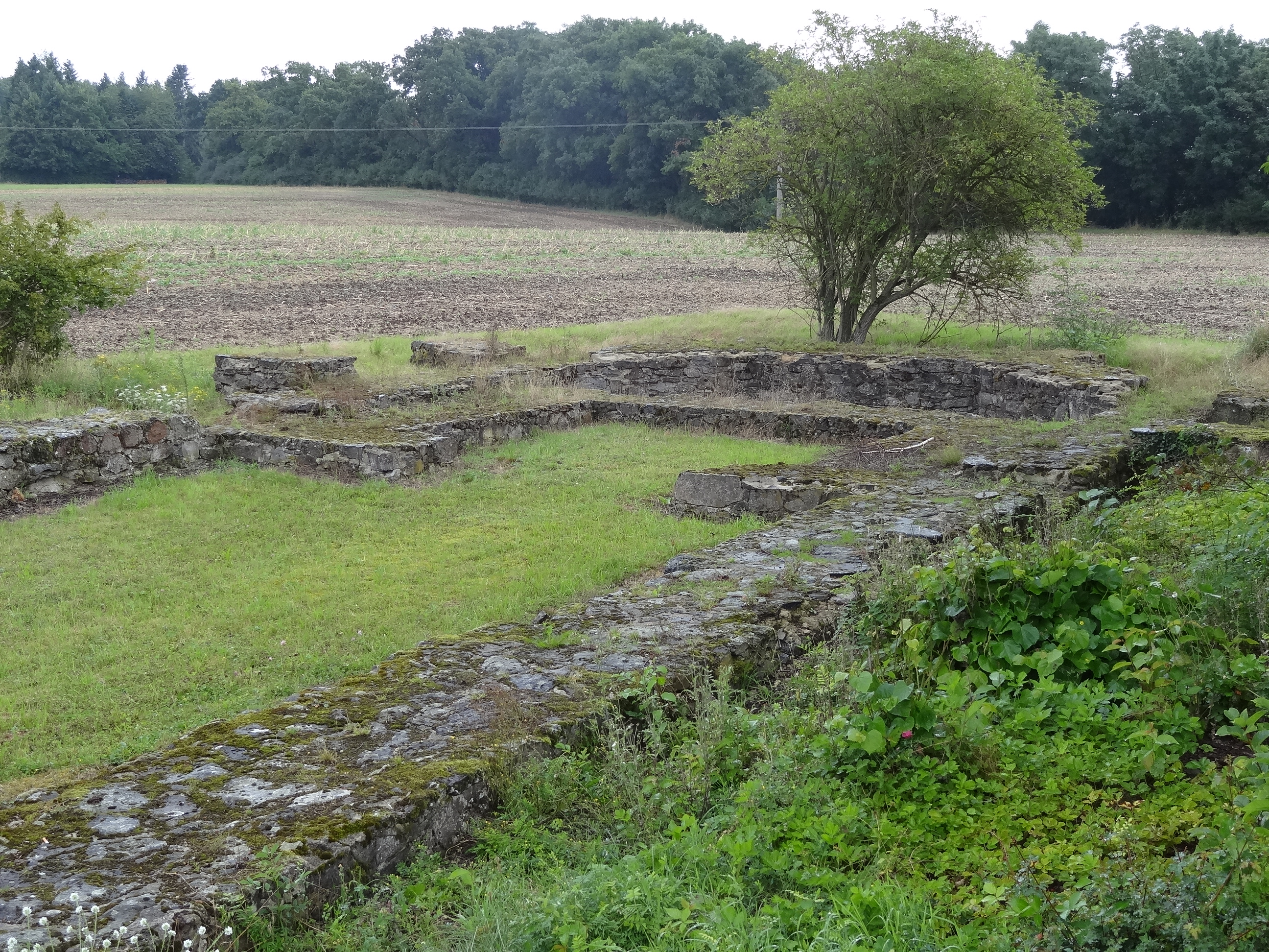 Burg Arnsburg